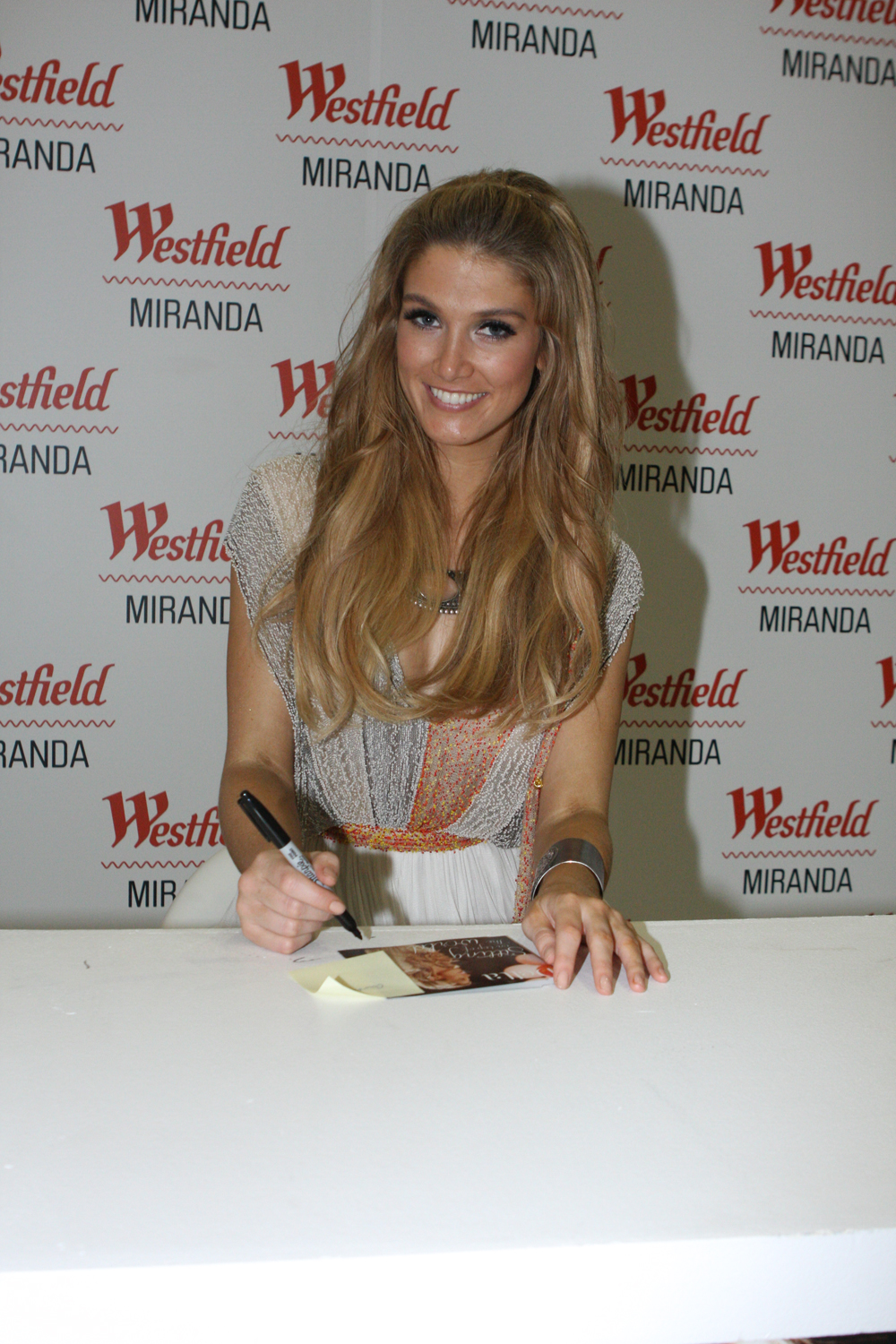 Delta Goodrem Does Signing at Miranda Westfield